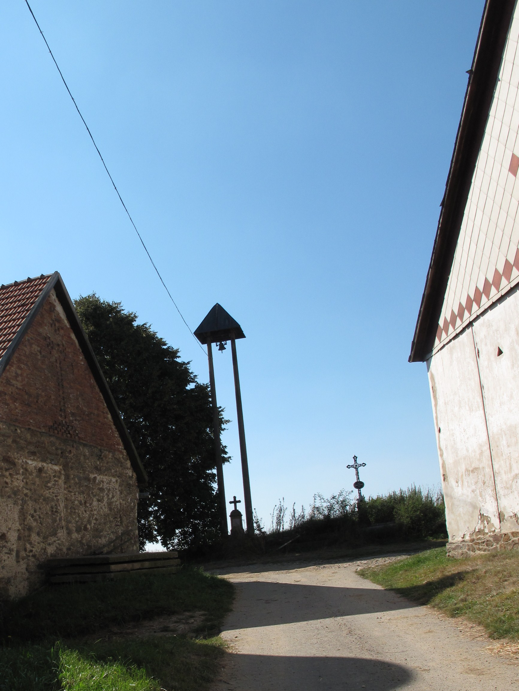 Malá Černá. Okres Pelhřimov, Česká republika.